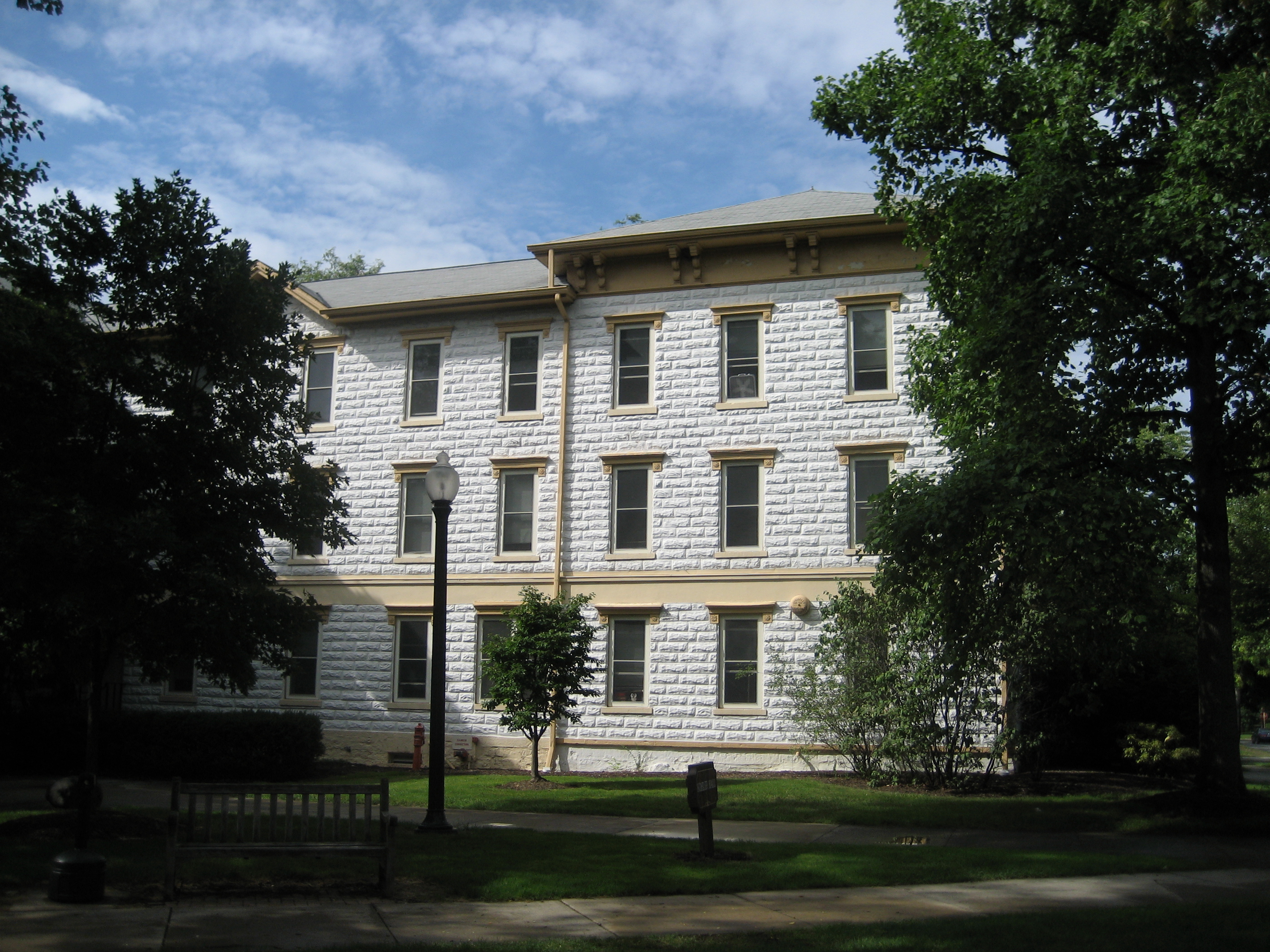 Kohler Hall at Baldwin-Wallace College